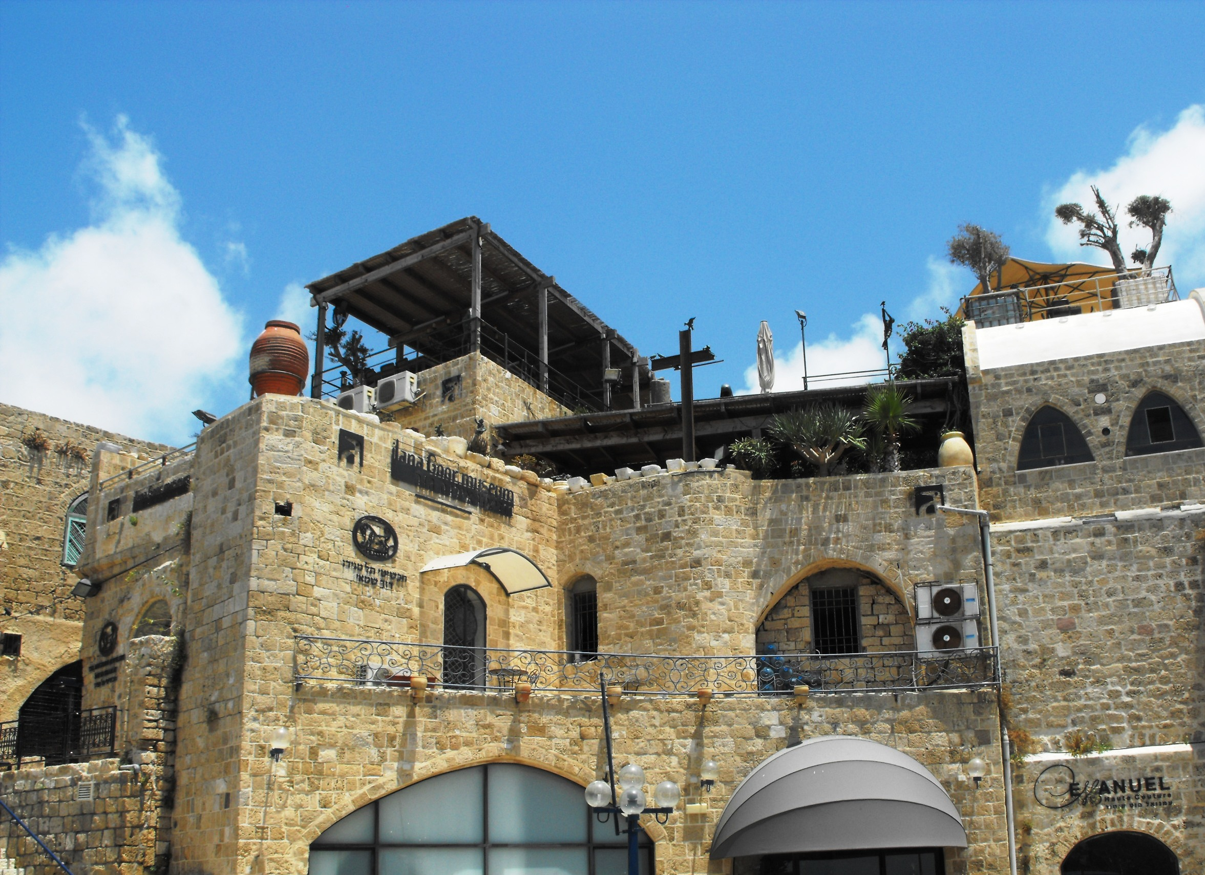 מתחם יפו העתיקה - יפו ההיסטורית, מוגדר כיום כשטח שהיה מוקף חומה במהלך המאה ה-19, מראש גבעת הכורכר של יפו ובמורד מדרונותיה, מרחוב יפת במזרח ובצפון ועד קרפיפי הנמל/הים במערב, ובדרום רחוב לואי פסטר.